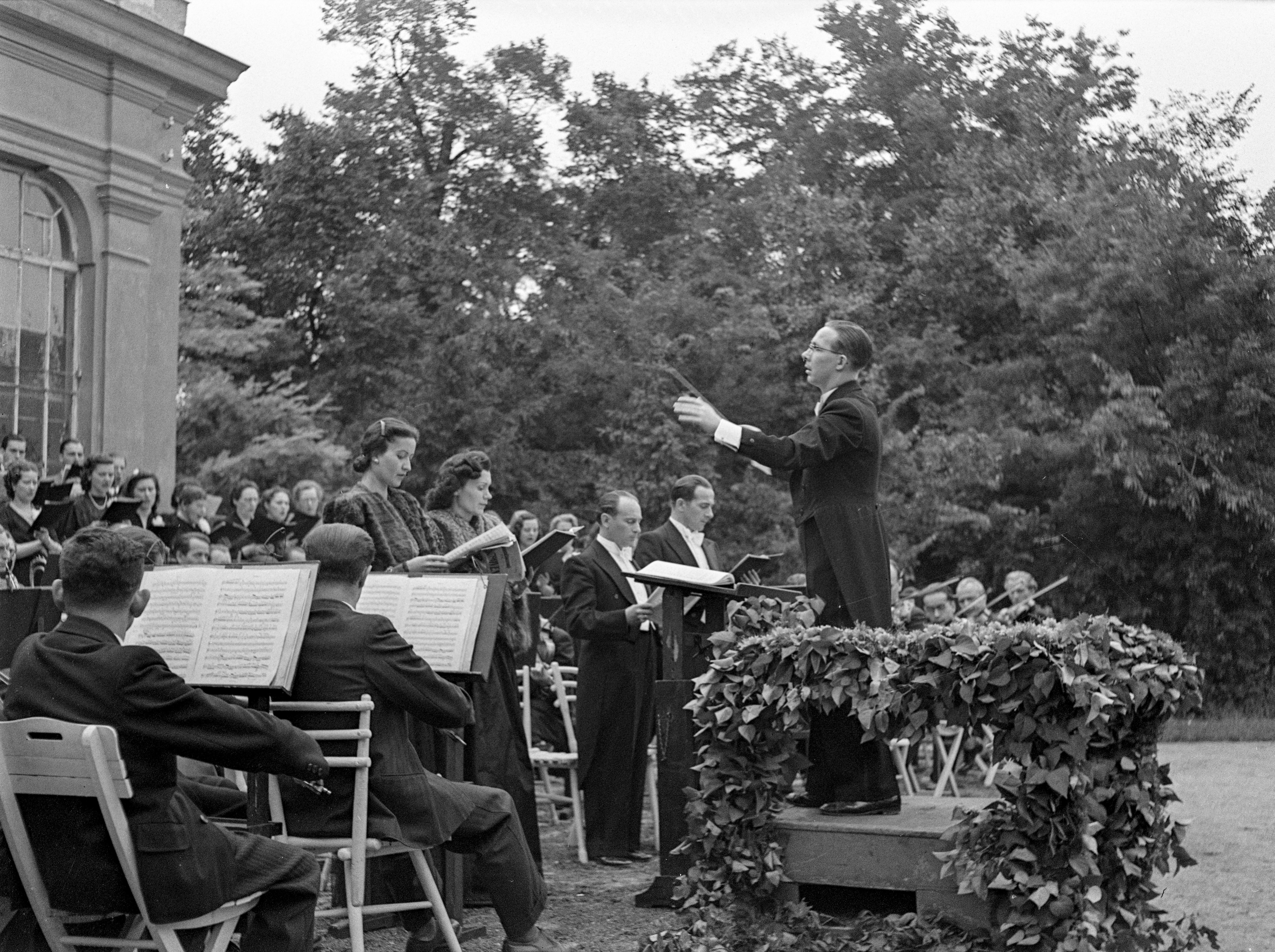 Angolkert, a Budapesti Kórus és a Székesfővárosi Zenakar hangversenye a Pálmaház előtt. László Magda, Máthé Jolán, Járay József és Rissay Pál a Magyar Állami Operaház énekesei, vezényel Péter József. Location: Hungary Tags: choir, conductor Title: Angolkert, a Budapesti Kórus és a Székesfővárosi Zenakar hangversenye a Pálmaház előtt. László Magda, Máthé Jolán, Járay József és Rissay Pál a Magyar Állami Operaház énekesei, vezényel Péter József.